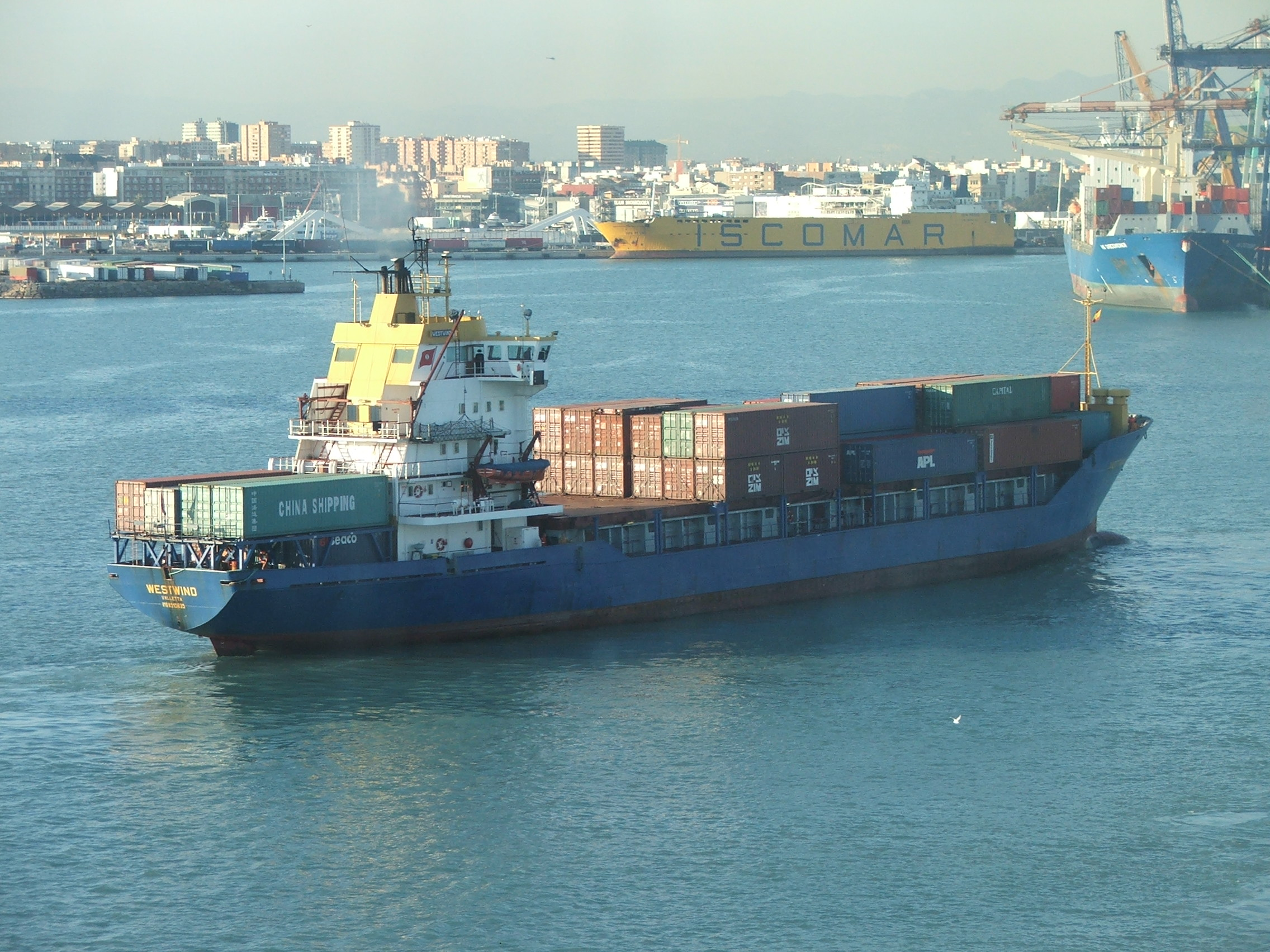 Das Containerfeederschiff Westwind